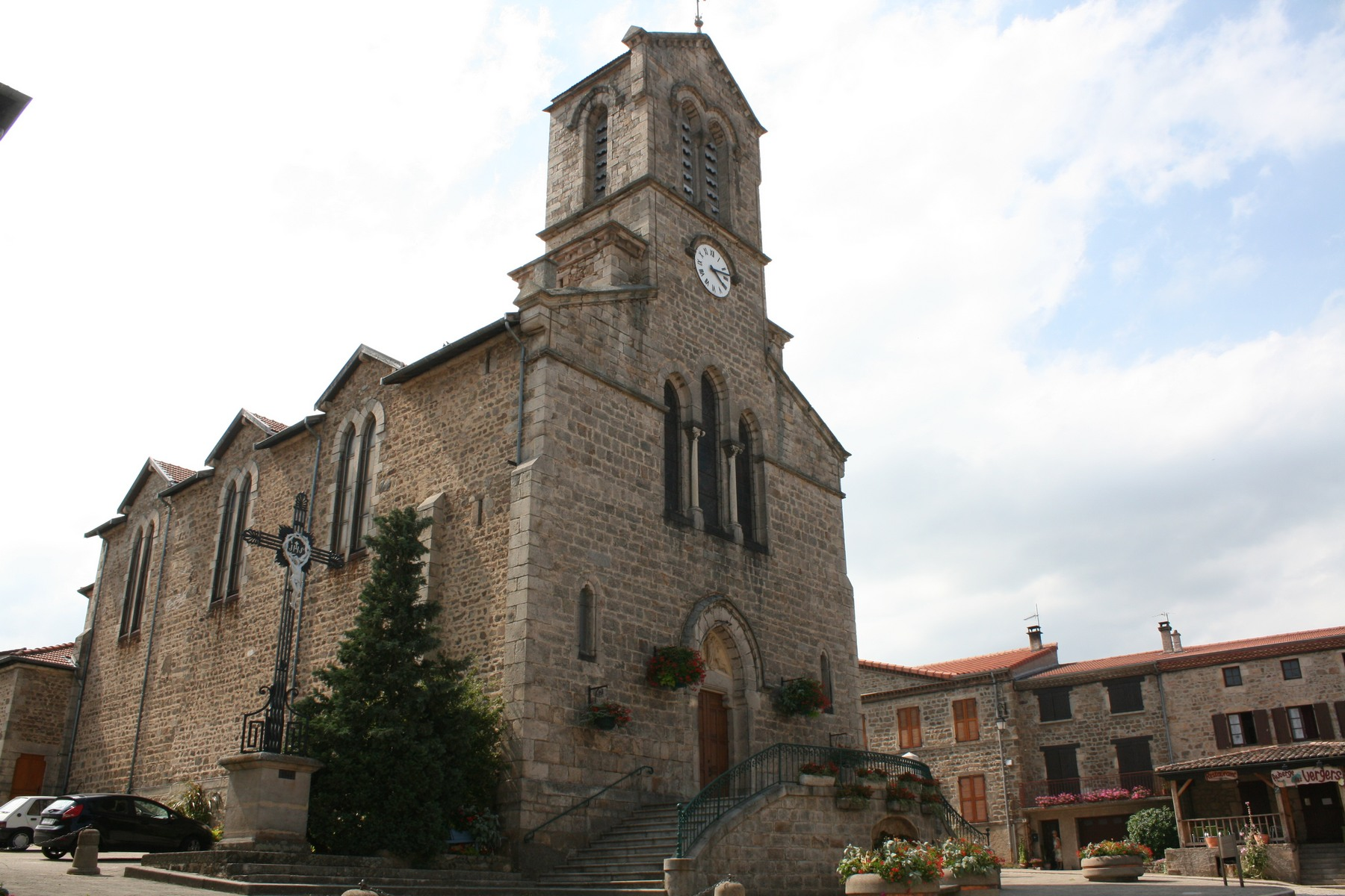 Eglise paroissiale St Pancrace